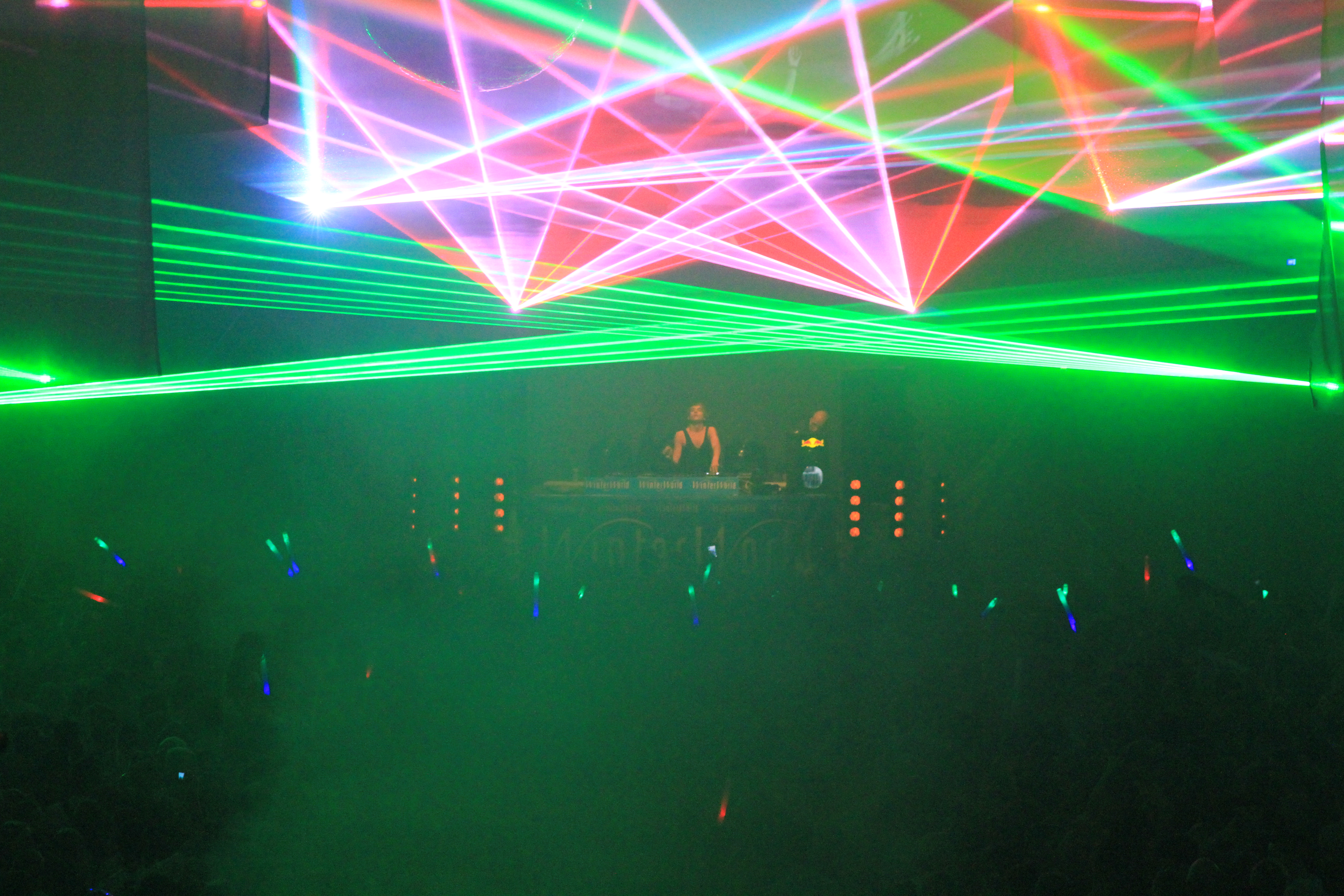 Danny Avila auf der Winterworld 2014